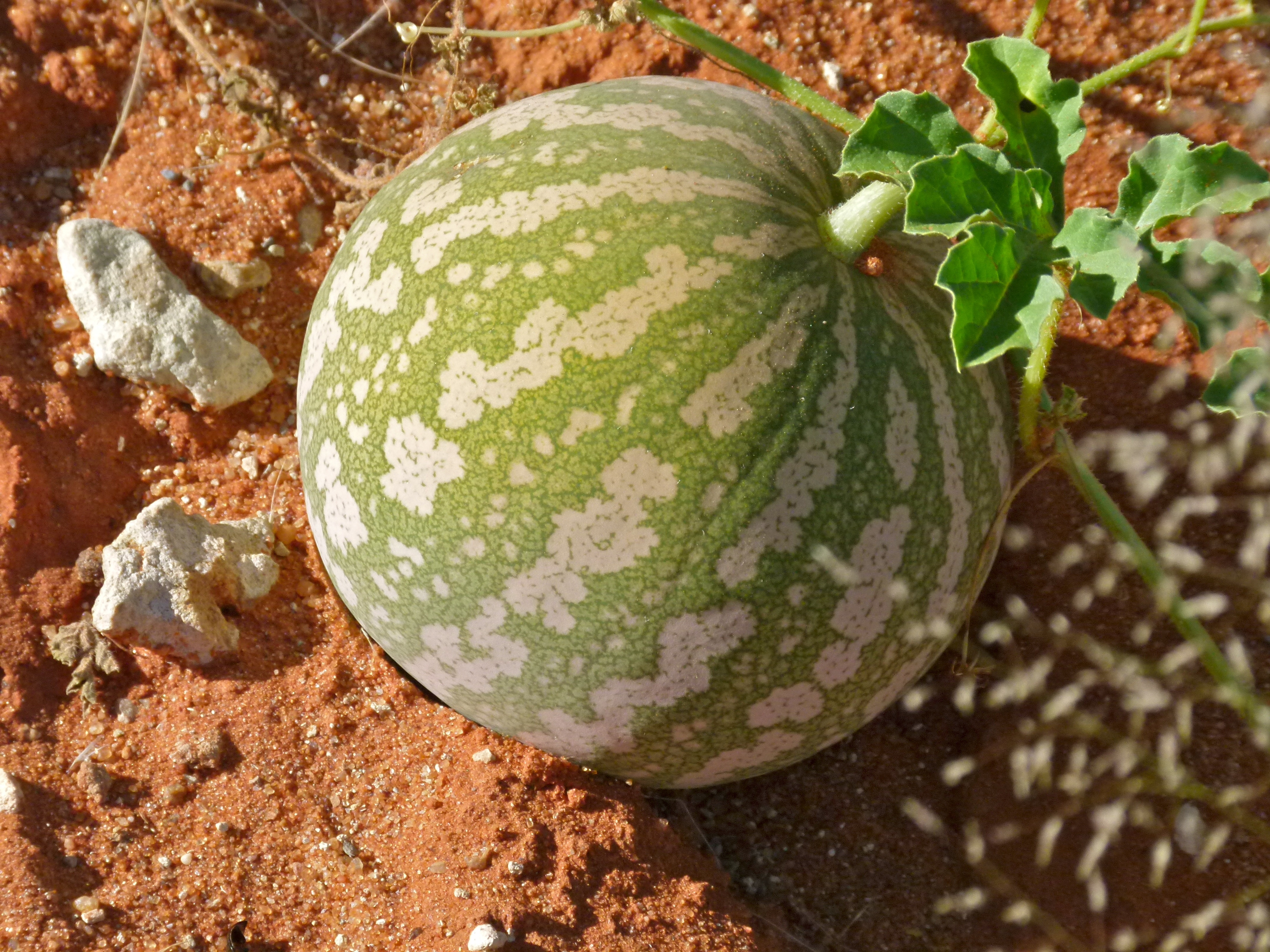 Twee Rivieren Camp, Kgalagadi Transfrontier Park, SOUTH AFRICA